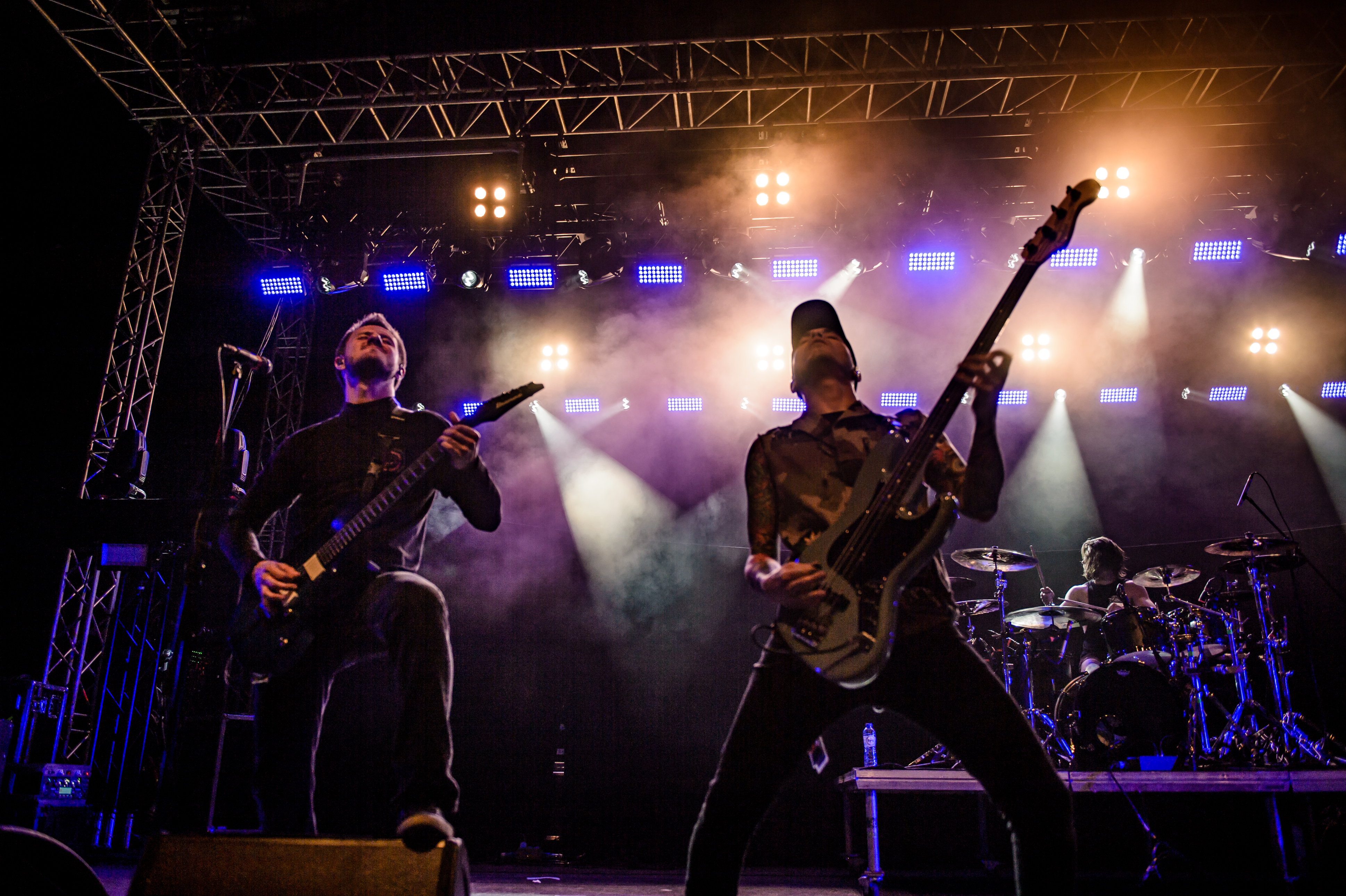 'Impericon Festival 2017; Oberhausen Turbinenhalle': 'Miss May I'